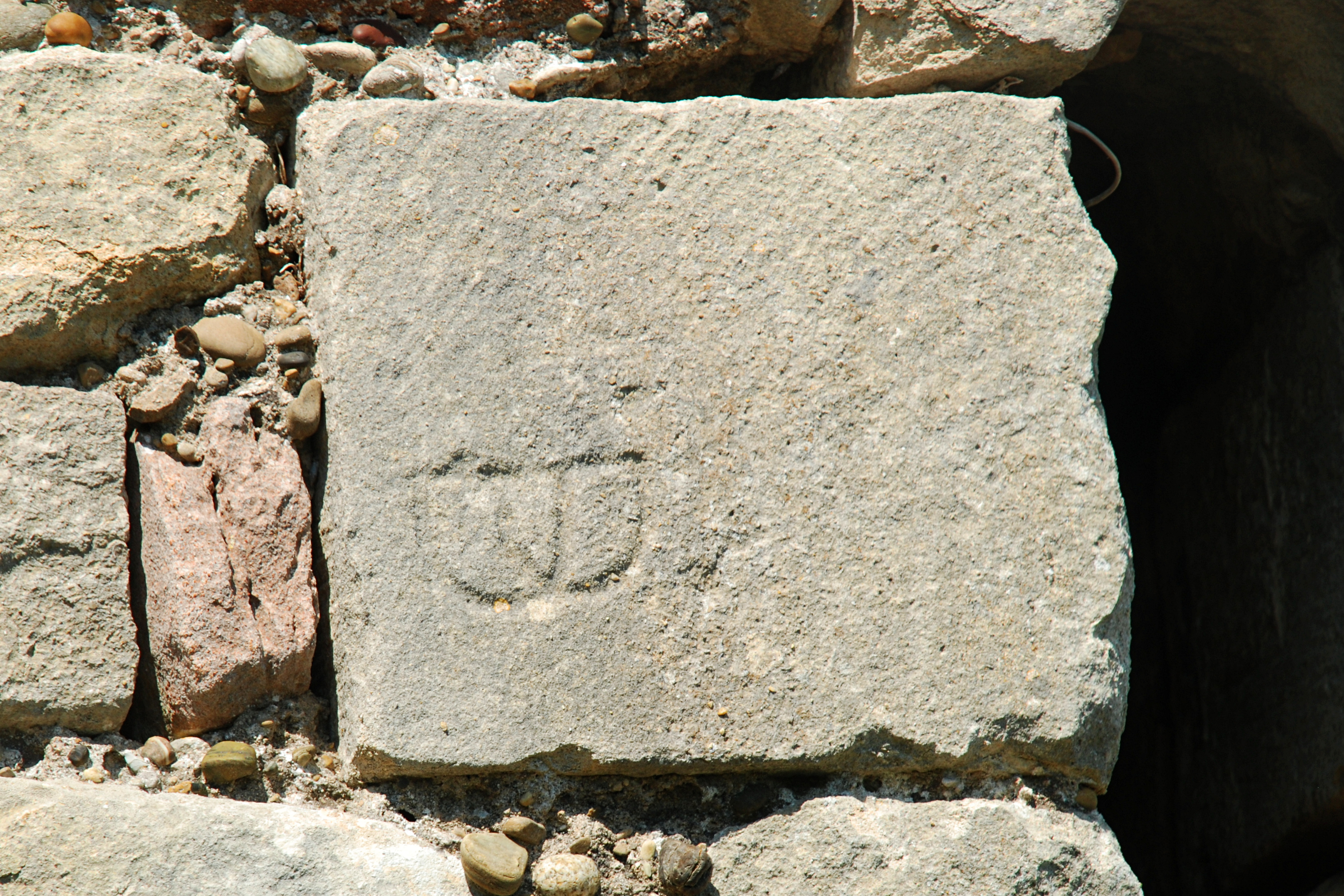 France - Gard - Saint-Étienne-des-Sorts - Chapelle Saint-Pierre